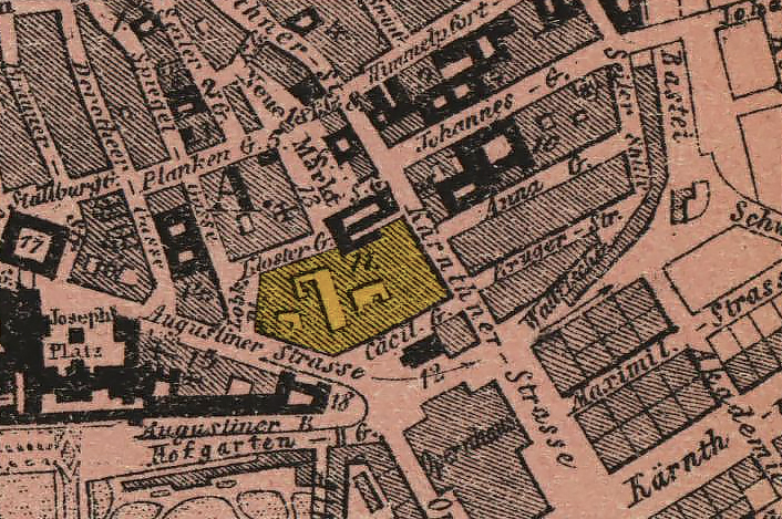 Wien, Innere Stadt, Lage des Bürgerspitals am Schweinemarkt